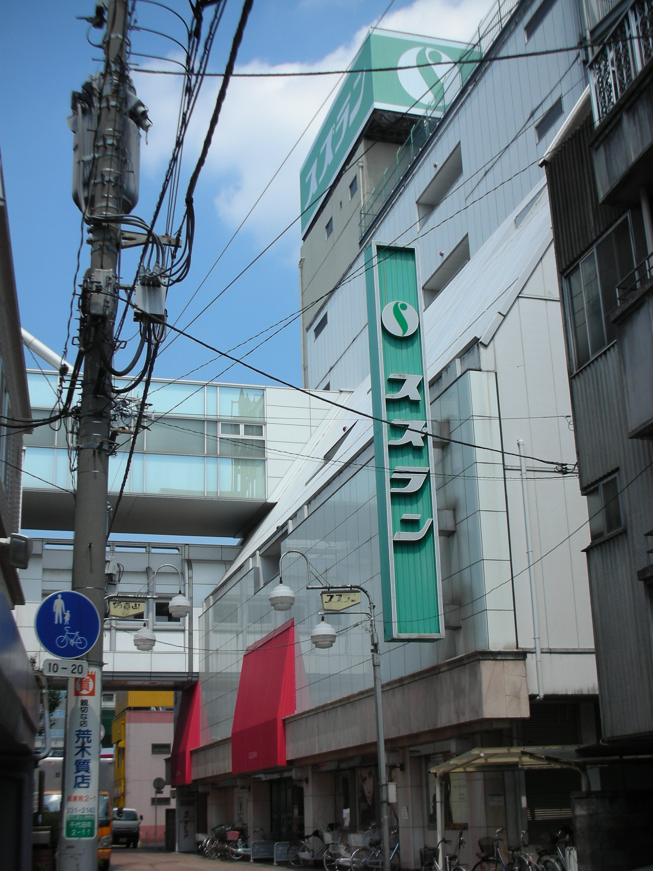 スズラン前橋店（本館）の外観